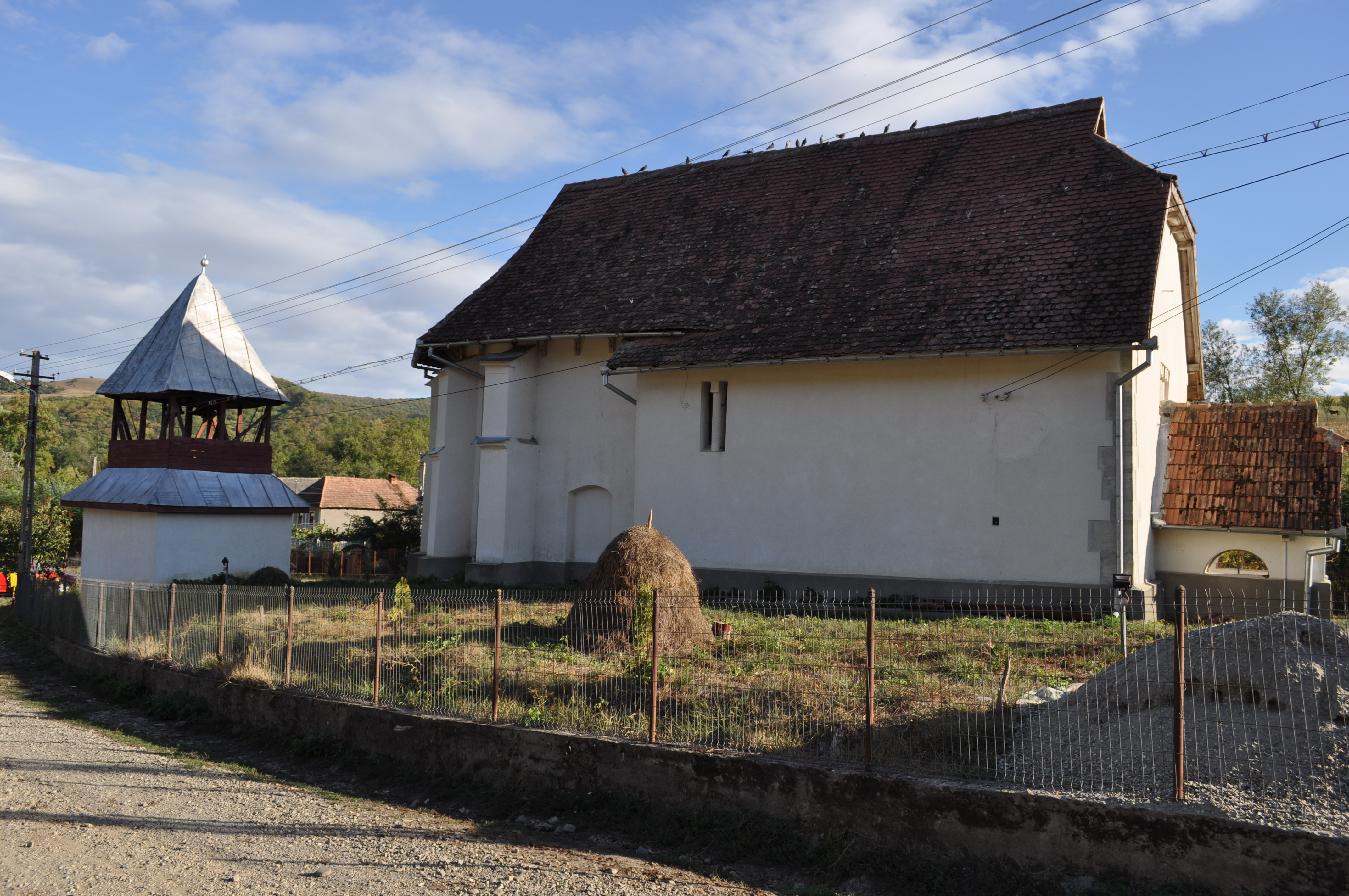 Ansamblul bisericii reformate, sat VIŢA; comuna NUŞENI